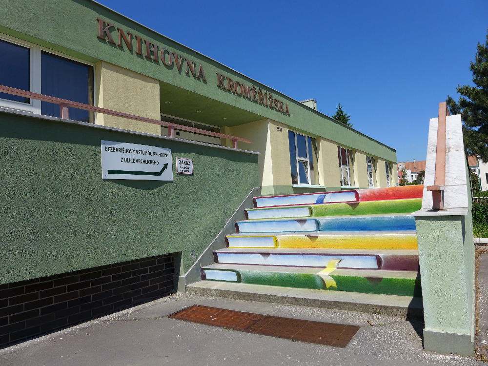 Budova Knihovny Kroměřížska na Slovanském náměstí 3920